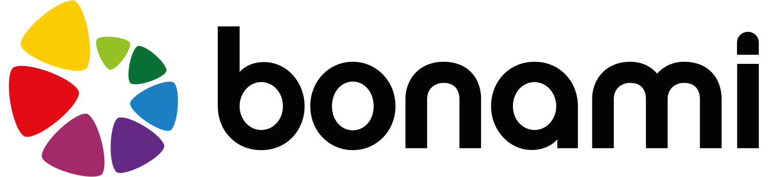 Bonami logo